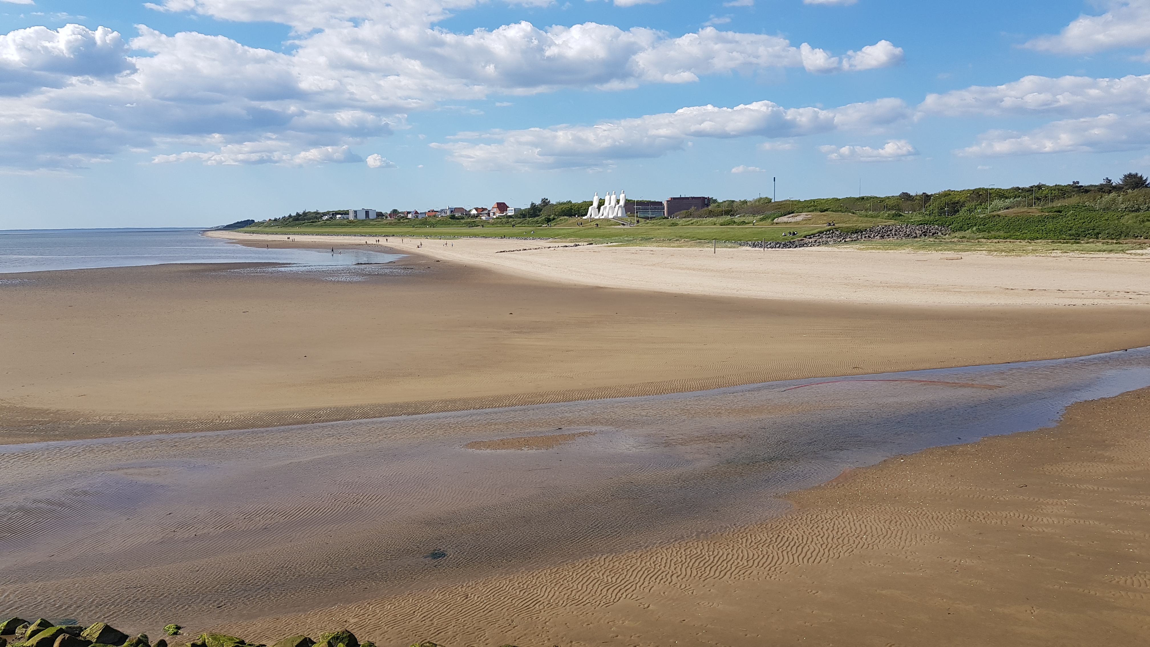 Sædding Strand